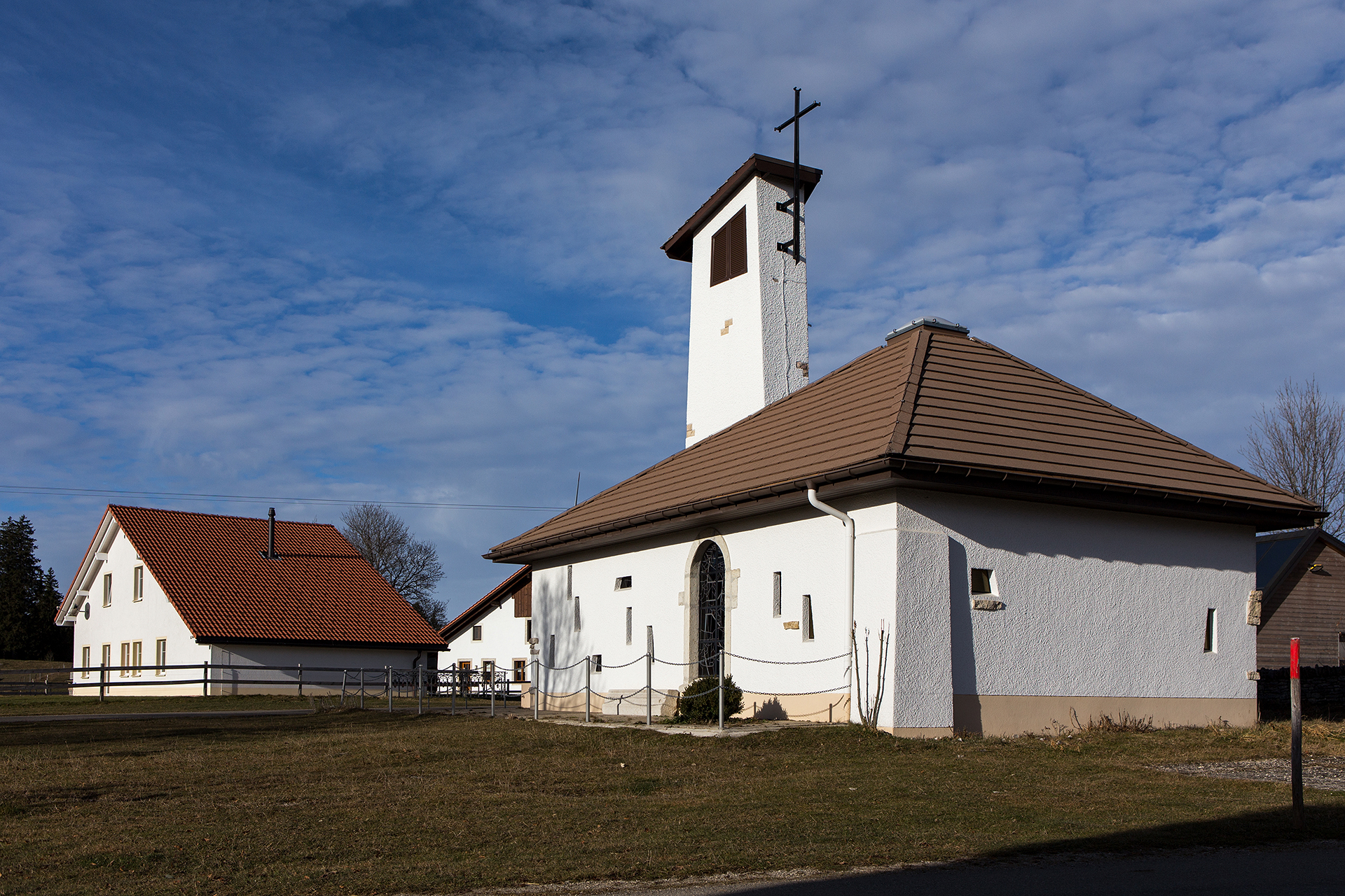 Kapelle in Le Peuchepatte (Gemeinde Muriaux, JU)